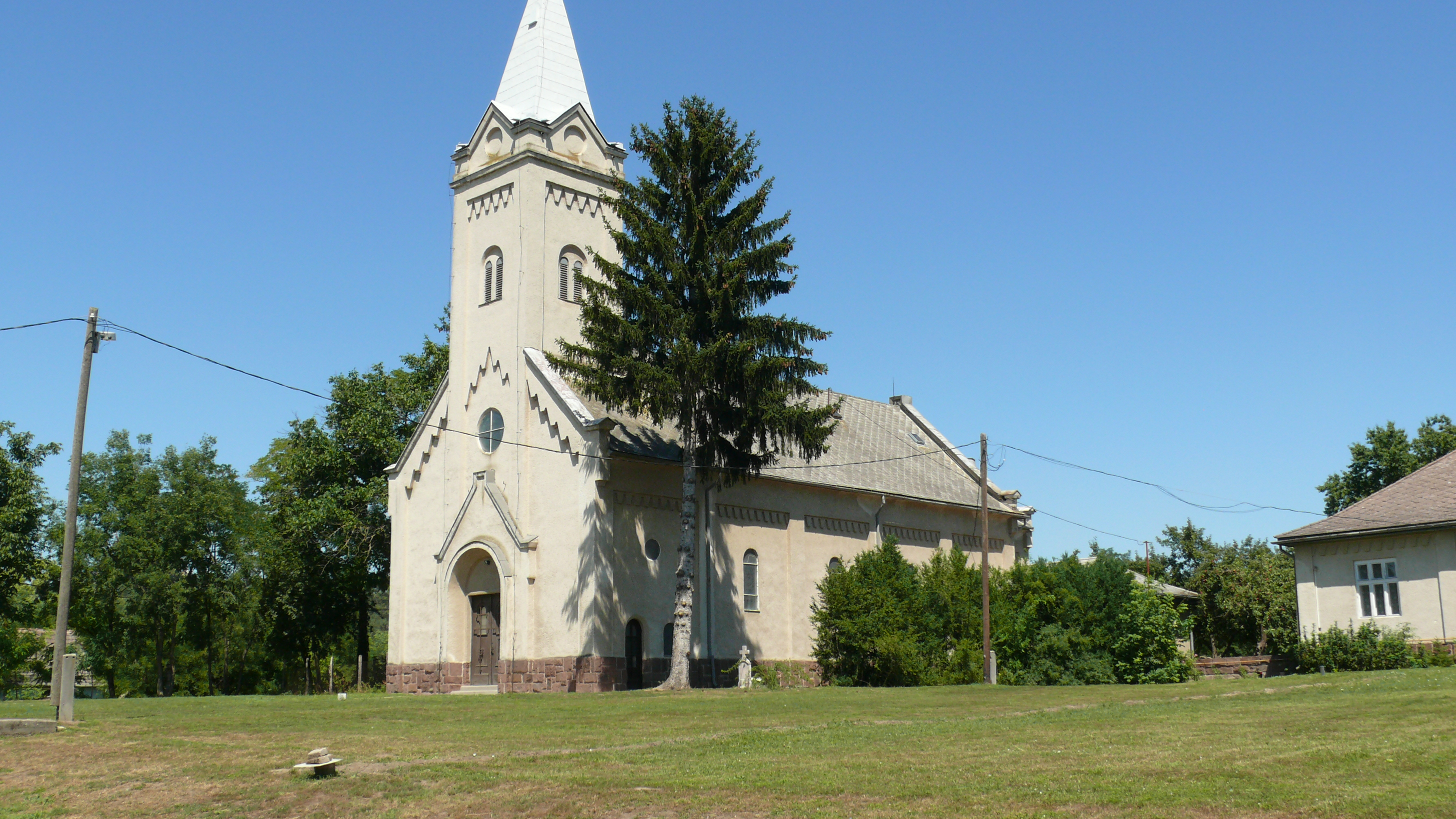 Mezőszilas, templom II.